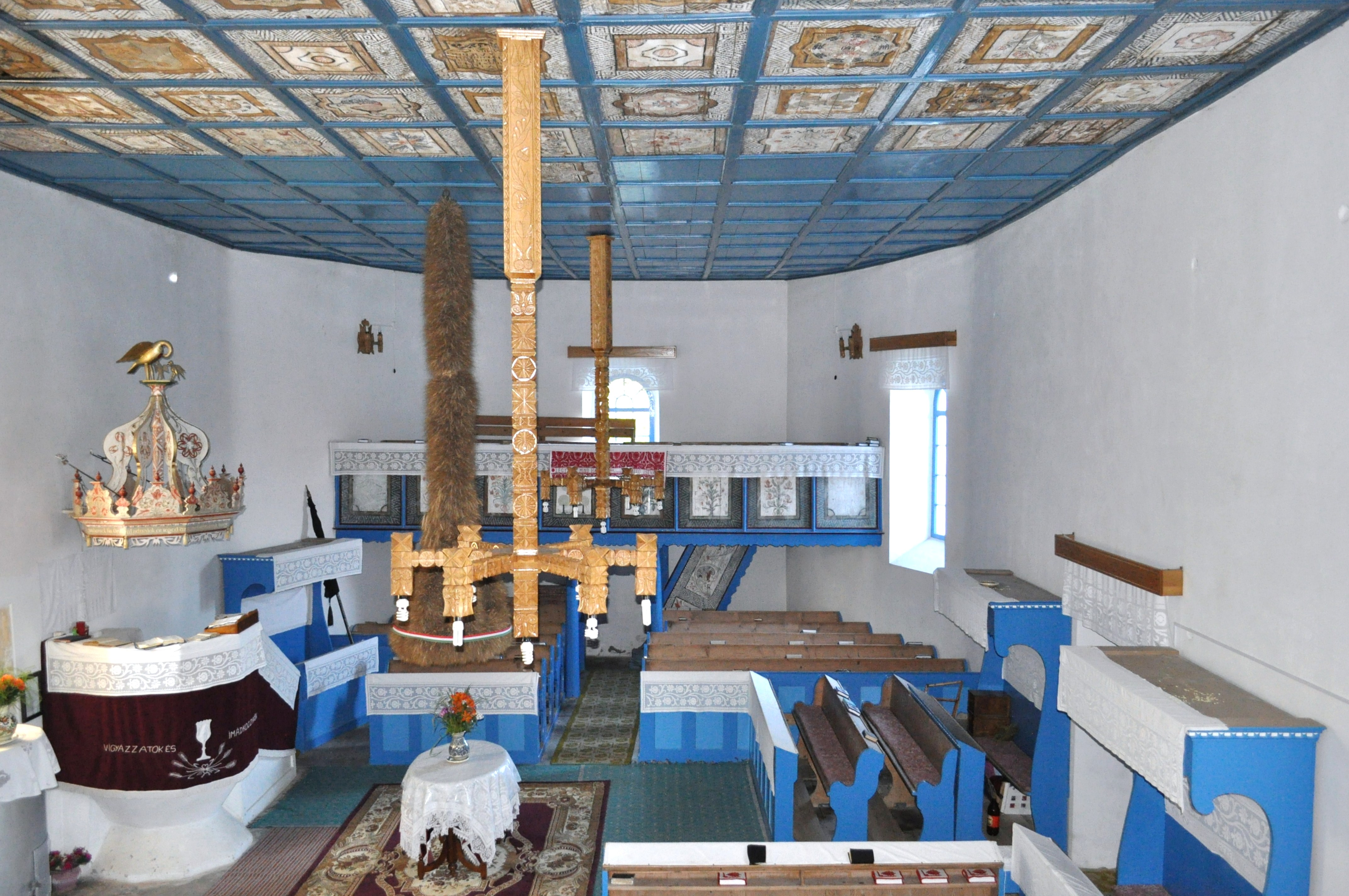 Biserica reformată, sat DUMBRAVA; comuna CĂPUŞU MARE, județul Cluj